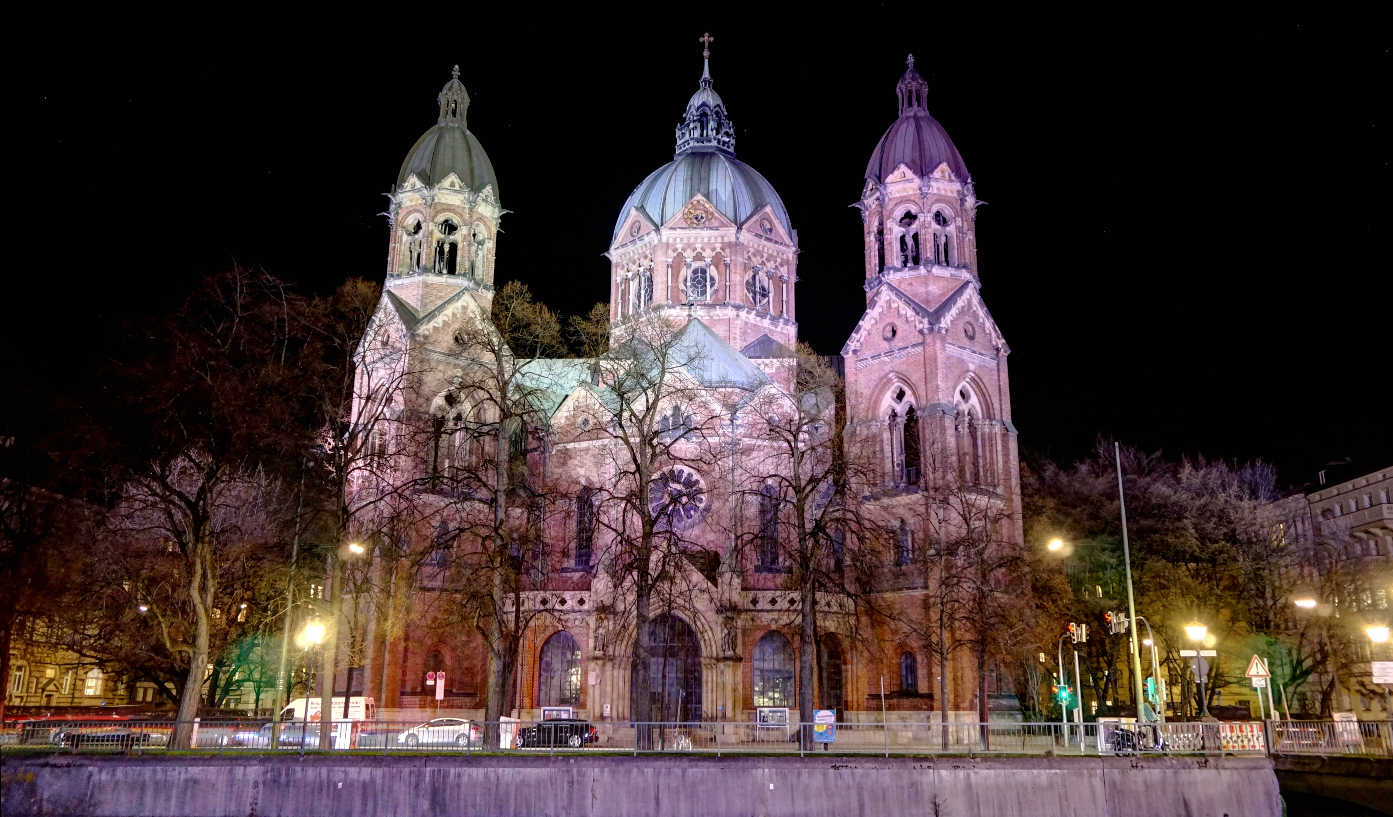 Deutschland, Bayern, Oberbayern, München, Lehel, evangelische St. Lukas Kirche, aufgenommen vom Wehrsteg zwischen Prater- und Museumsinsel